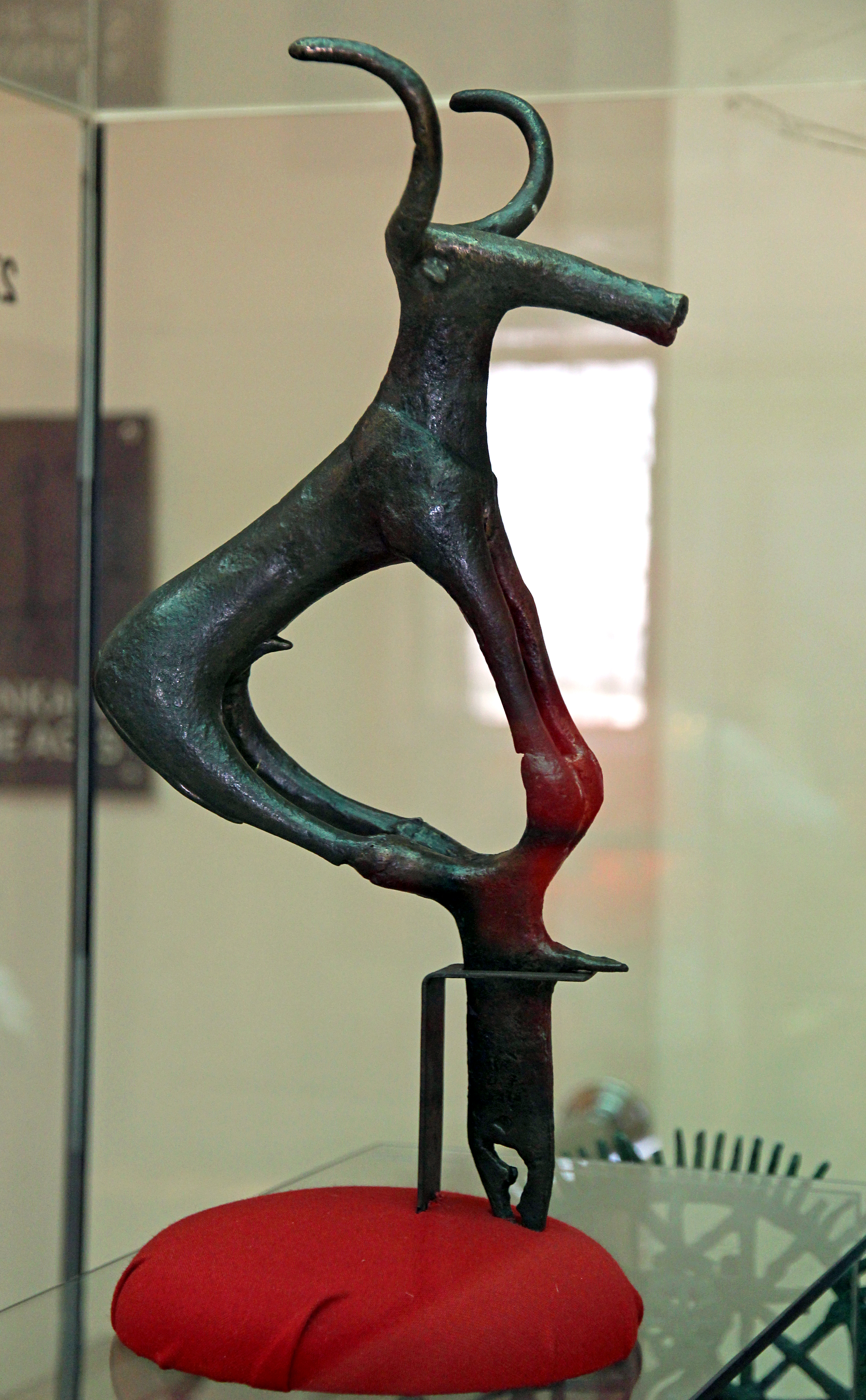 Standarte aus Alaca Höyük mit Darstellung eines Stieres im Museum für anatolische Zivilisationen in Ankara